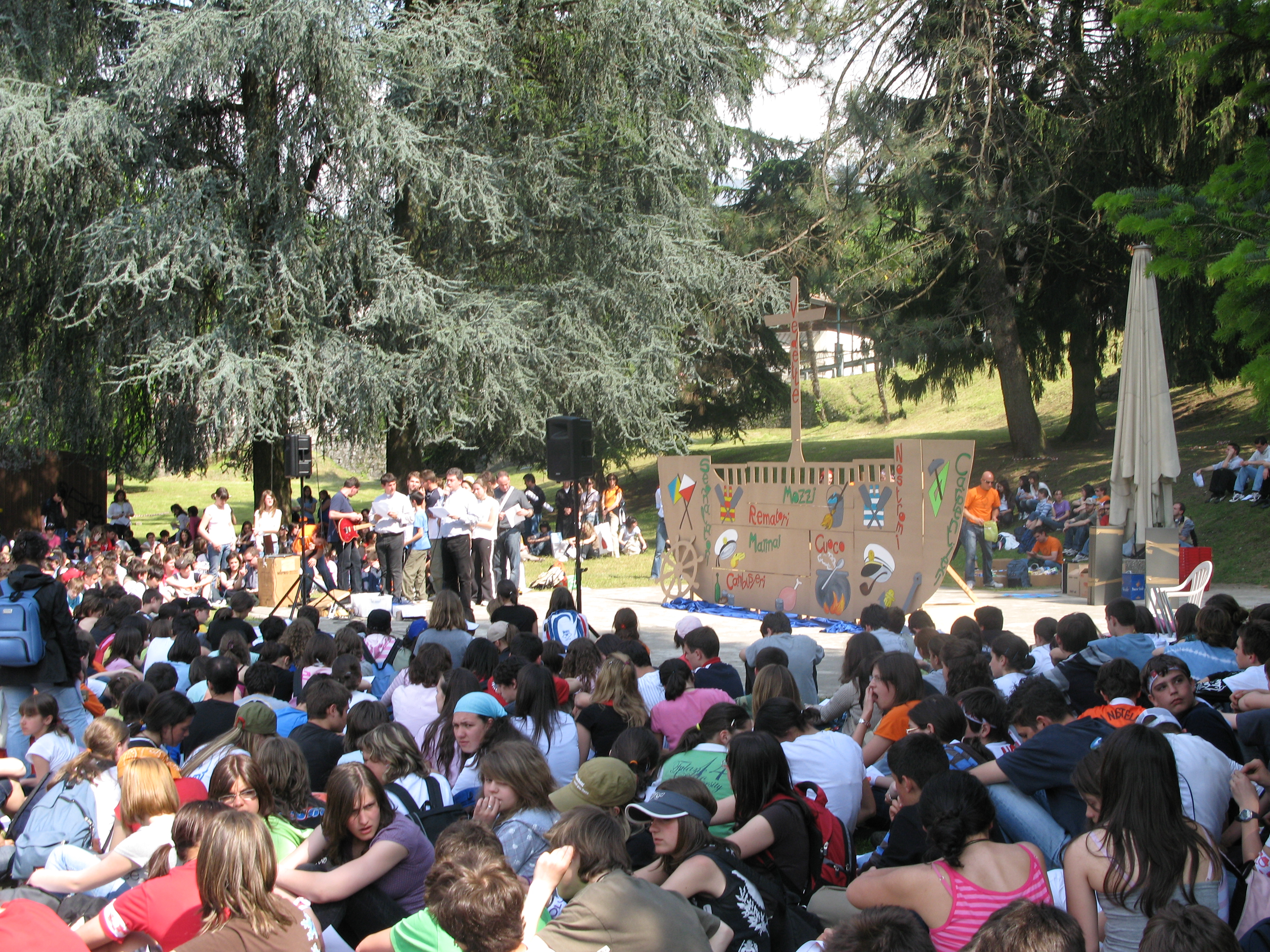 i ragazzi del Molo 14 che costruiscono una barca di legno con i pezzi dei vari gruppi